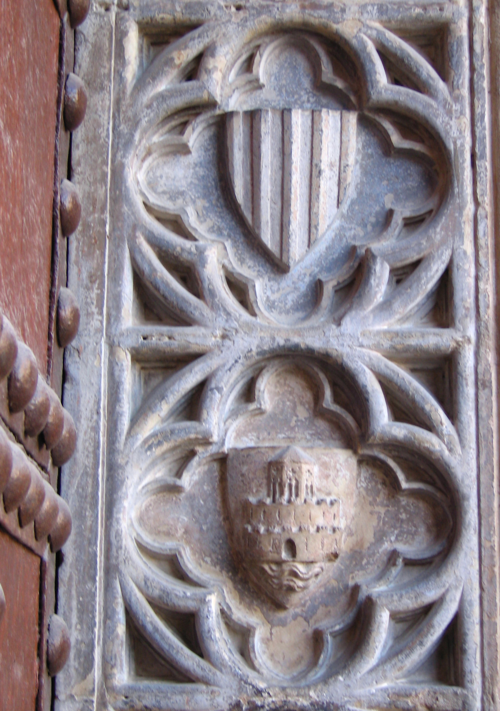 Detall de la porta gòtica, o «Porta dels Apòstols», de la Catedral de Santa Maria de València: Dos dels escuts que hi apareixen. Amunt, el Senyal Real, escut del rei i Regne de València. Baix escut atribuït per alguns autors a la ciutat de València i per altres a la família del bisbe Jazperto de Botonach (1, 2, 3). Hi apareix al costat d'altres escuts de famílies importants que van contribuir a la catedral. S'assembla a una imatge (amb una ciutat emmurallada) que apareix en un dels primers segells de la ciutat, de 1312.